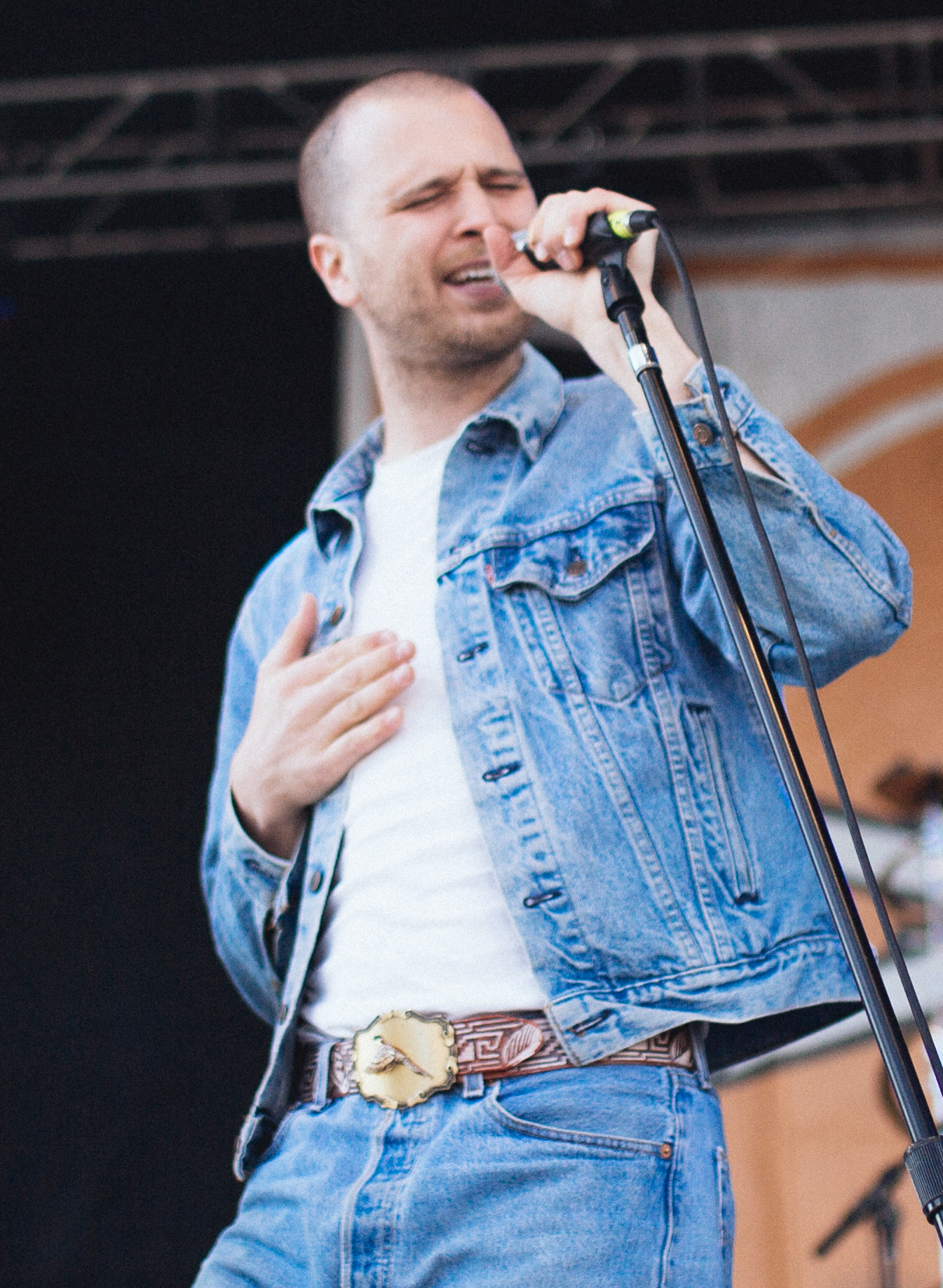 jmsn